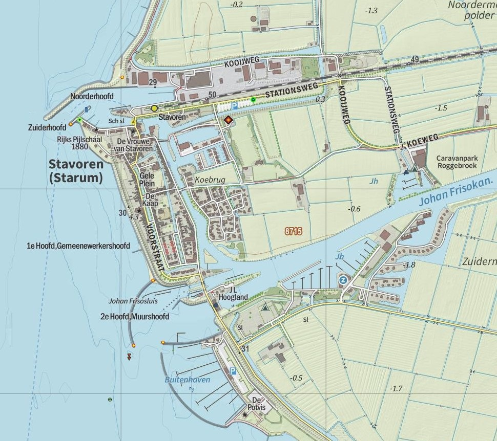 Kaart van Stavoren